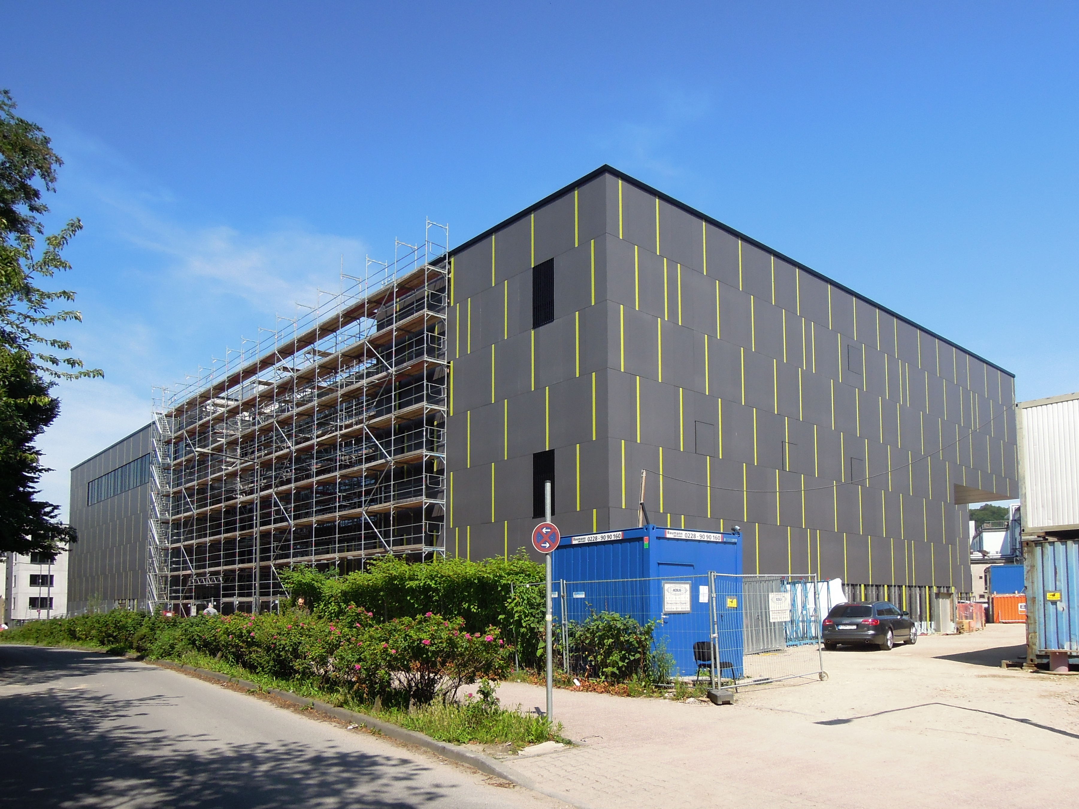 Hörsaalzentrum "CARL" der RWTH Aachen